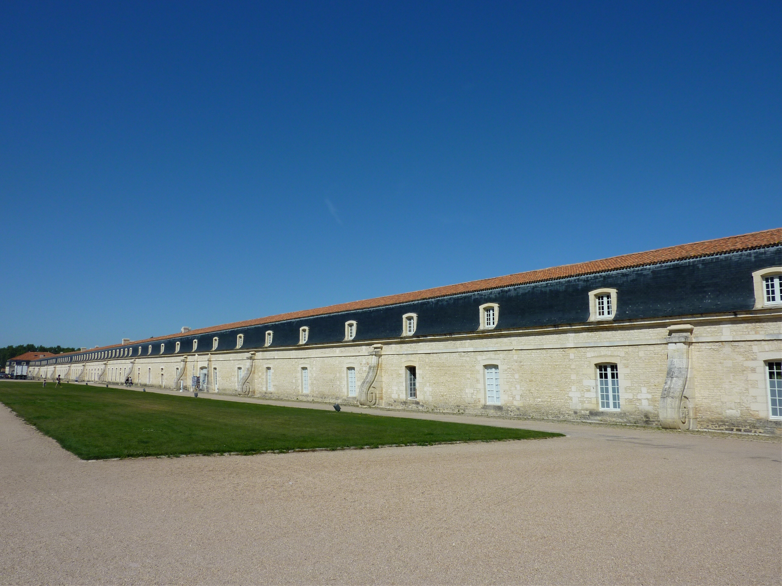 La Corderie Royale Rochefort Charente Maritime France